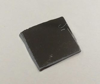 Dopeeritud ränidioksiidist plaat, millele on tehislikult peale kasvatatud õhuke ränidioksiidi kiht.